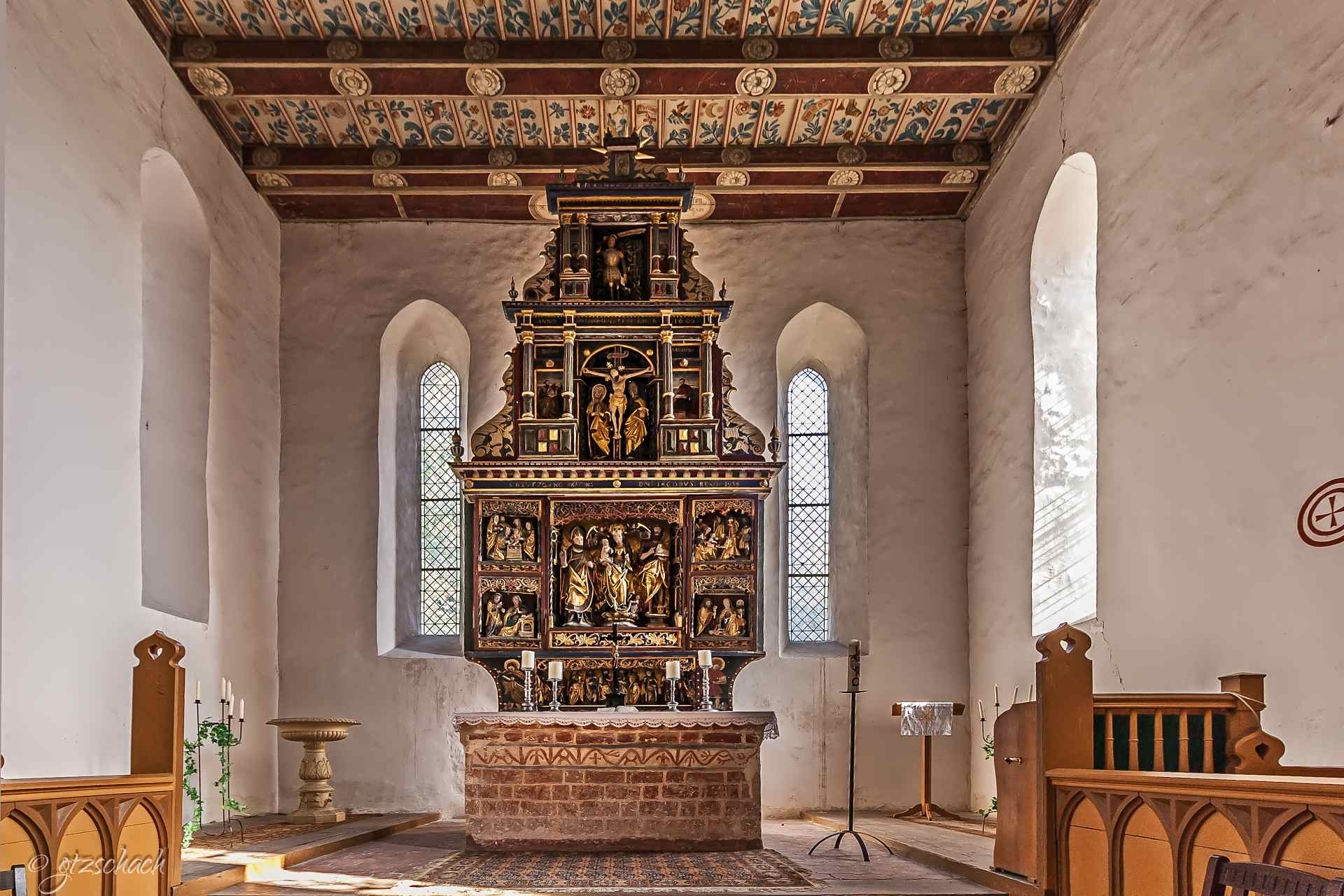 Dorkirche Briest - Schnitzaltar aus dem 13. Jahrhundert